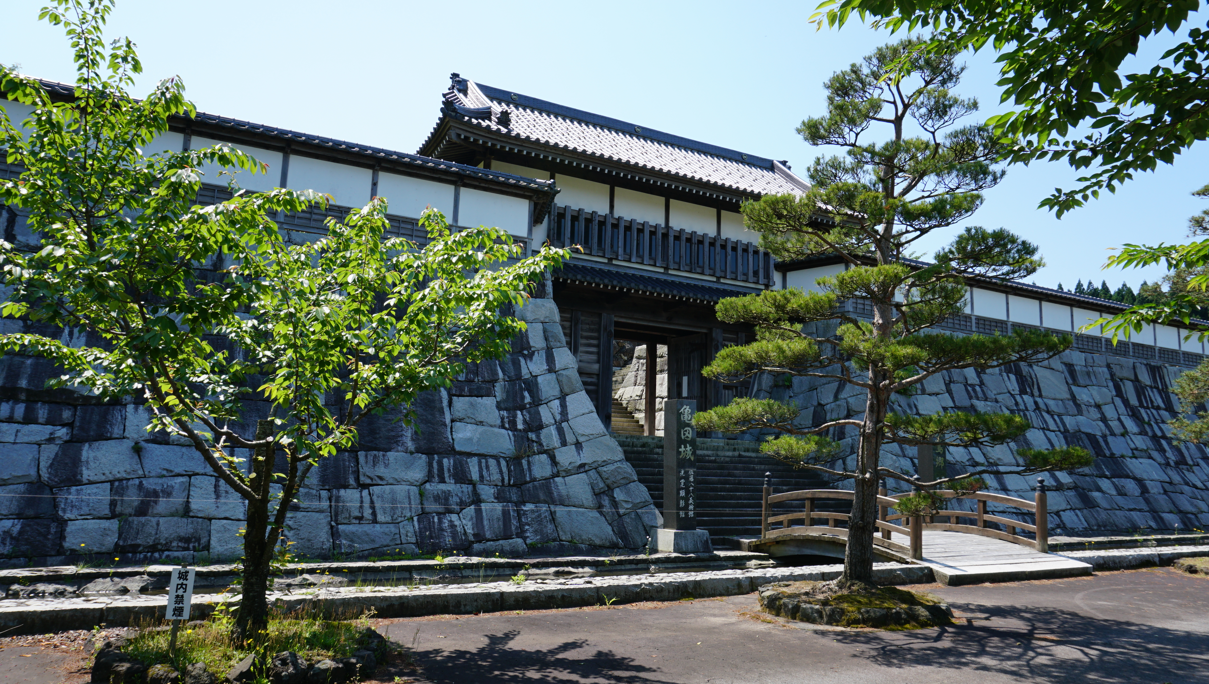 亀田城復元城門（天鷺村、佐藤八十八美術館）